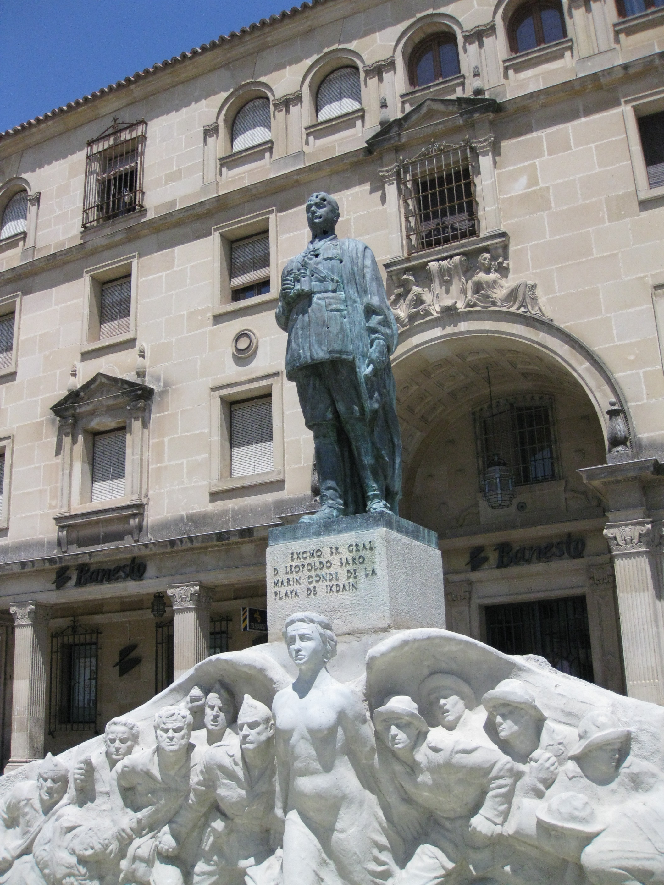 Conjunto Histórico de la Ciudad de Úbeda